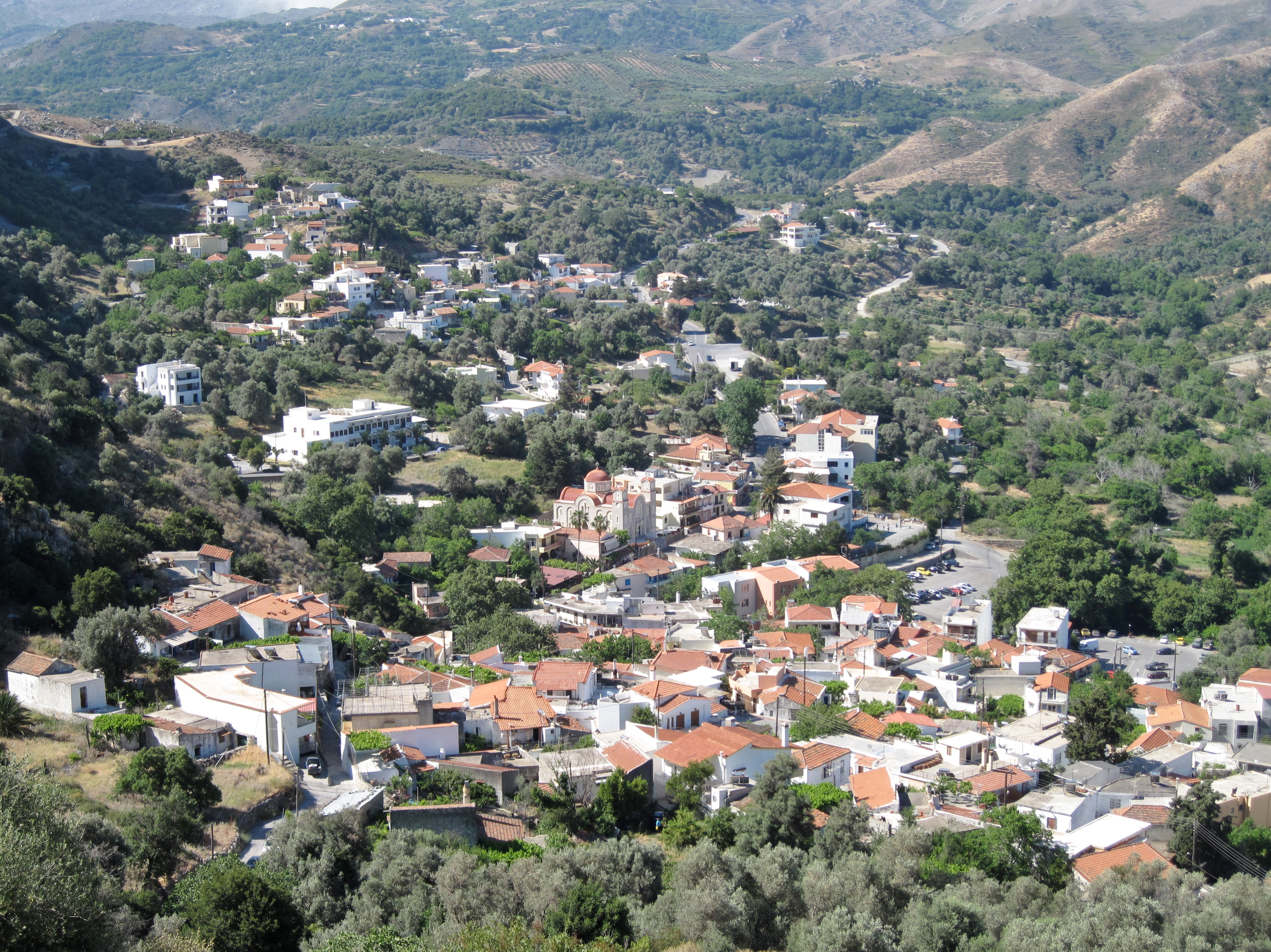 Spili, Gemeinde Agios Vasilios, Regionalbezirk Rethymno, Kreta, Griechenland